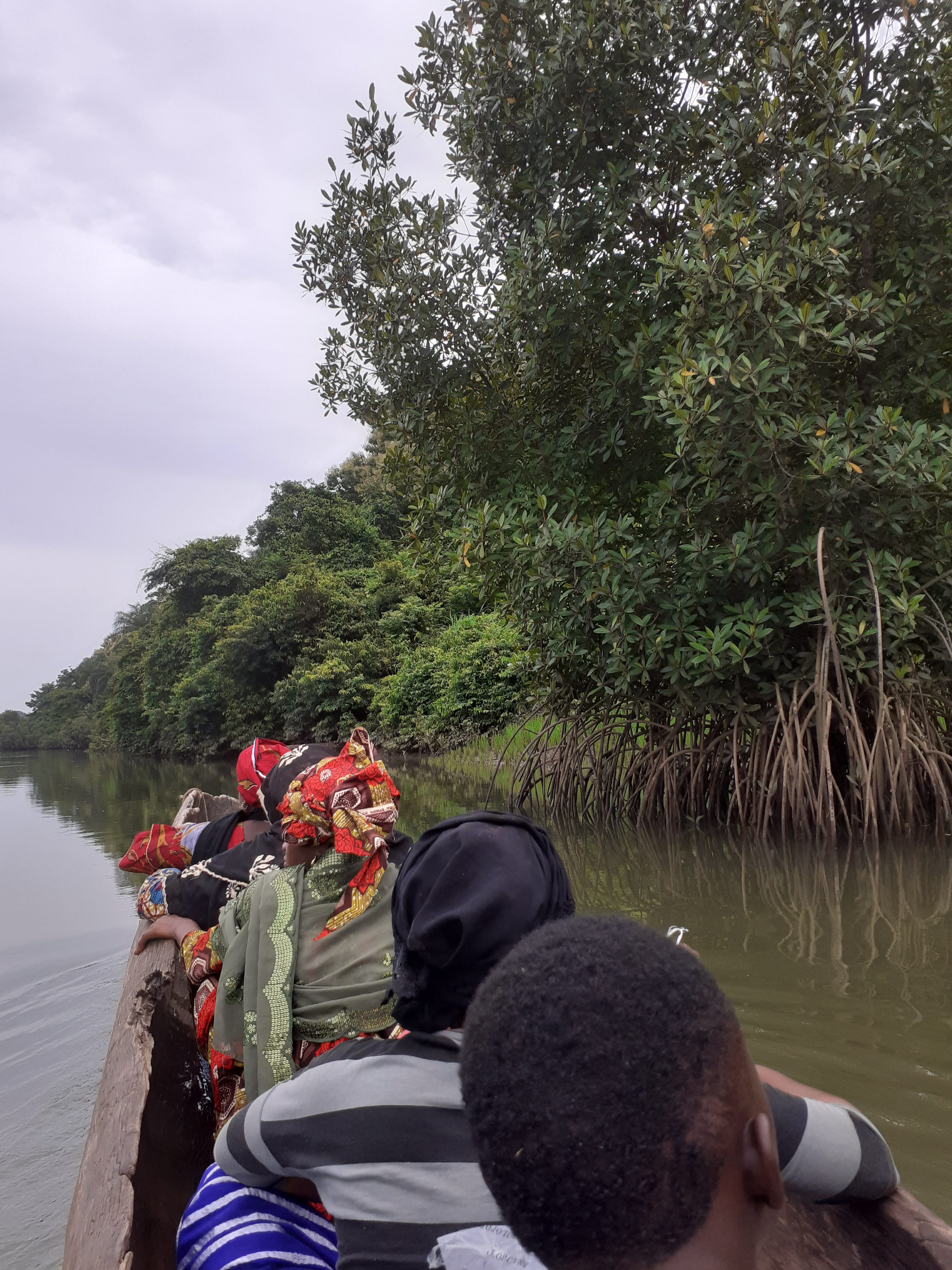 Passant sur le Rio nunez This is an image with the theme "Africa on the Move or Transport" from: Guinea